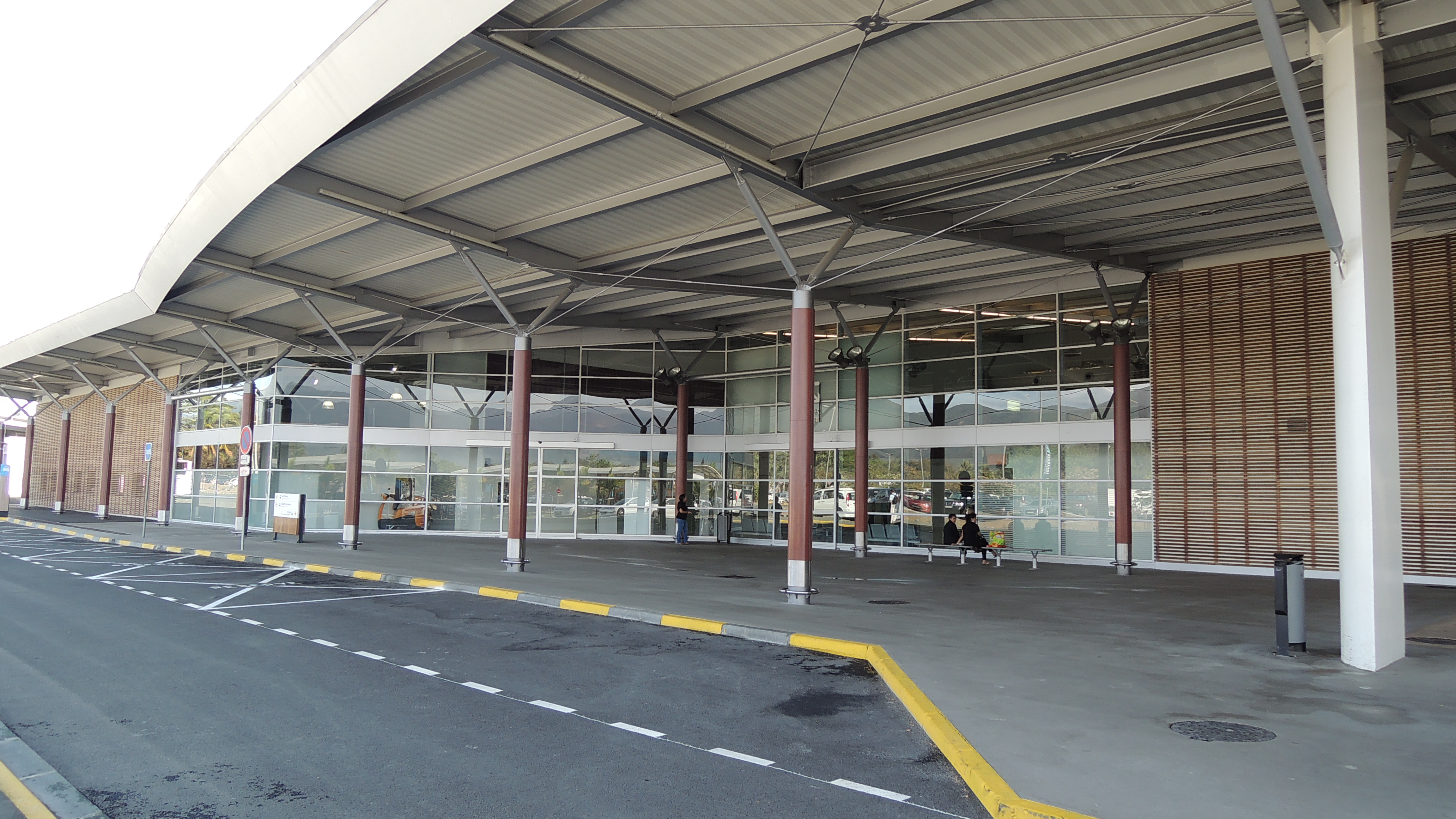 Hangar de l'aéroport